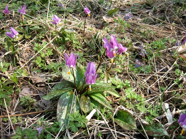 Цветущий кандык сибирский (Erythronium sibiricum) в черневом осиннике окр. пос. Танзыбей (Красноярский кр., Ермаковский р-н).